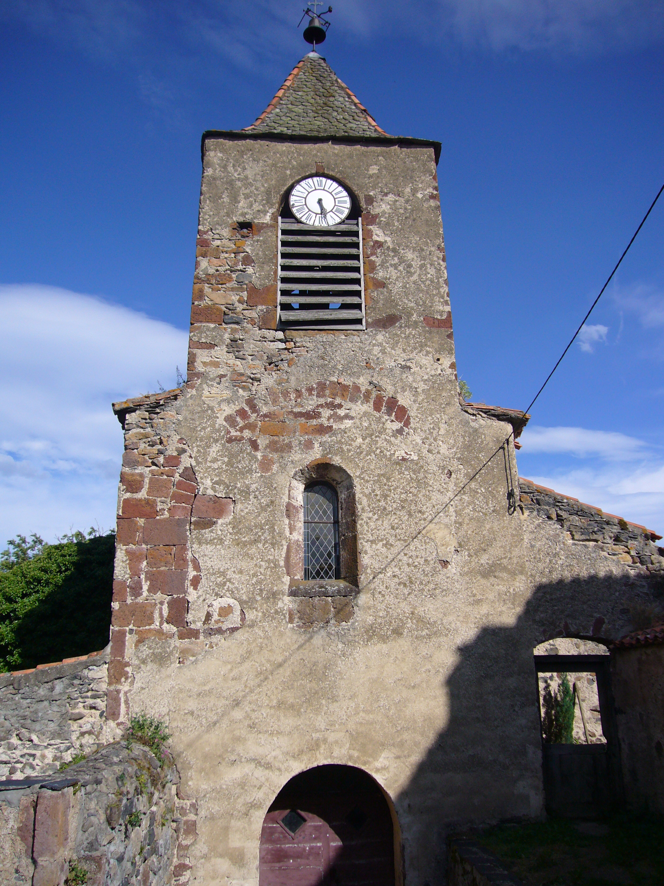 Église de Rentières .